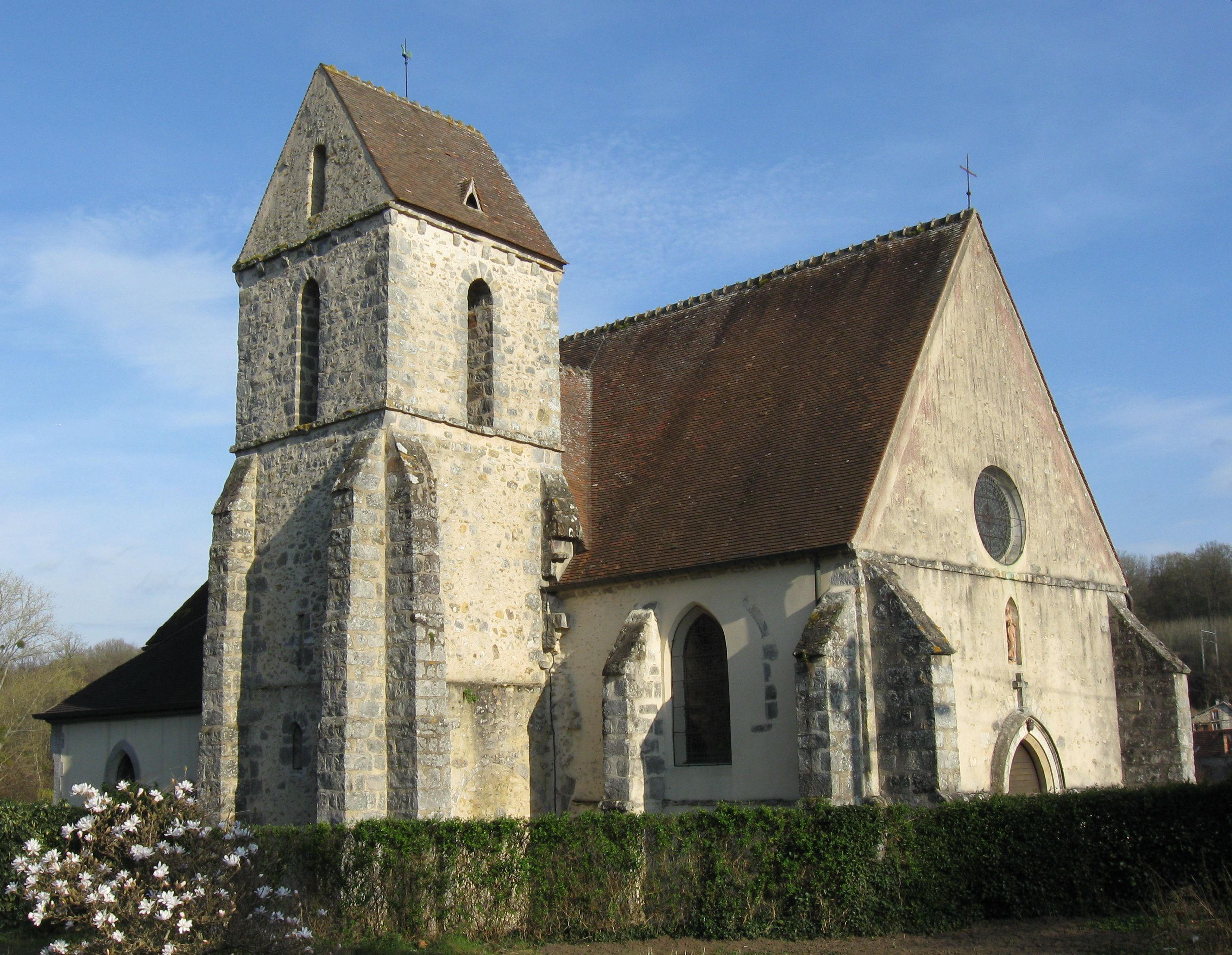 Église Saint-Hilarion de Saint-Hilarion. (Yvelines, région Île-de-France).